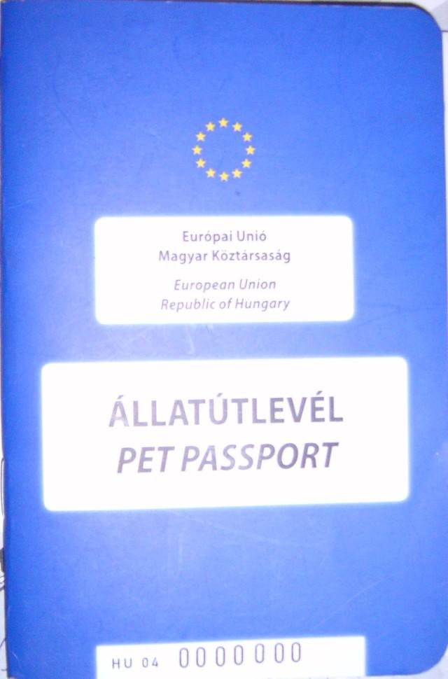 EU pet passport Hungary - EU Heimtierausweis Ungarn